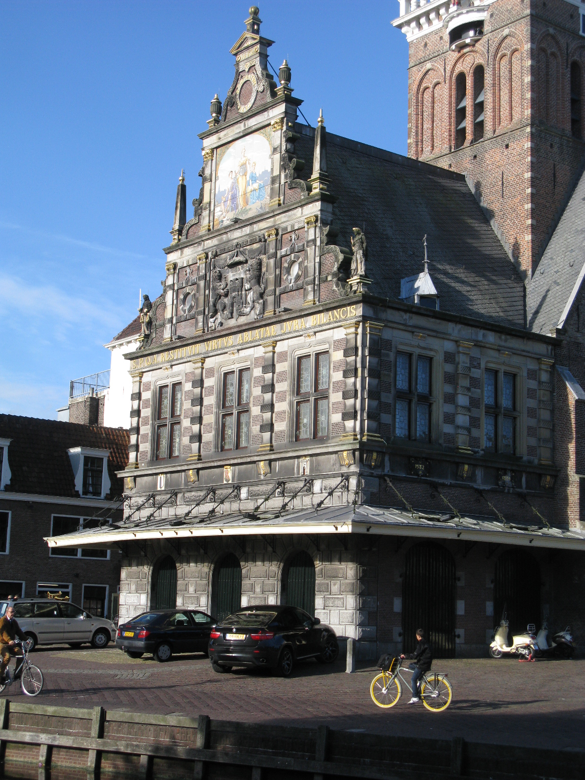 Alkmaar